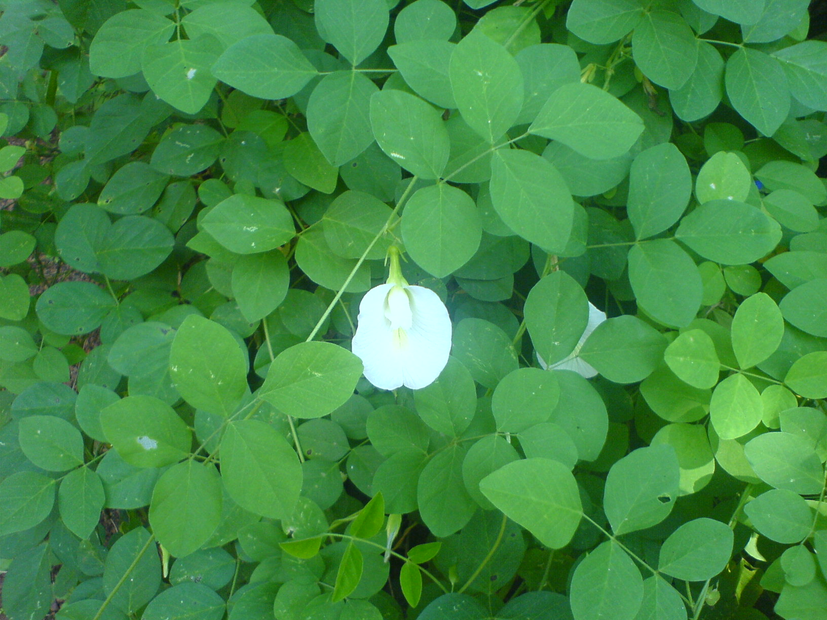 വെള്ള ശംഖുപുഷ്പം